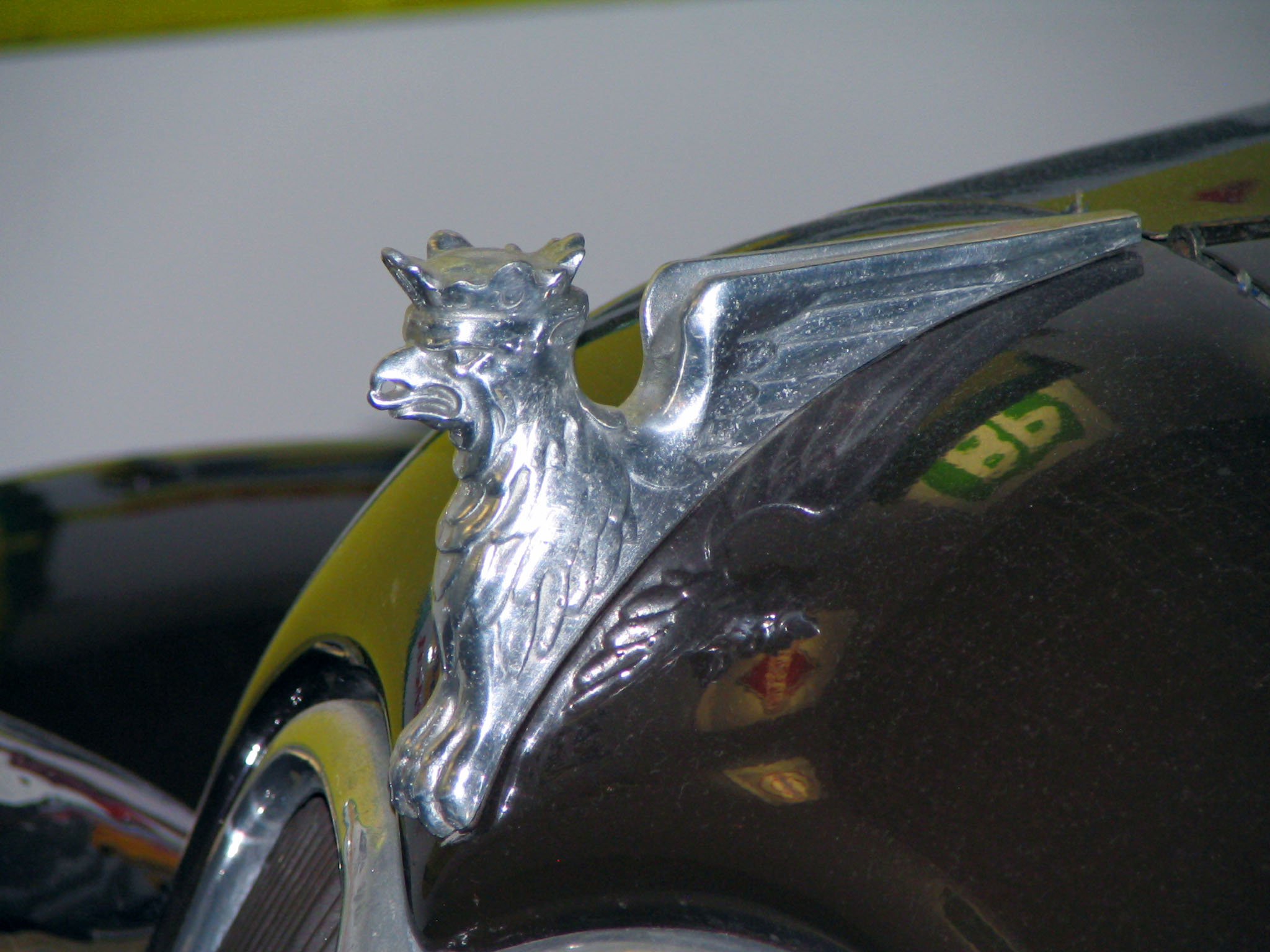 Hood ornament Stoewer Sedina 1937-1940 Kühlerfigur Stoewer Sedina 1937-1940